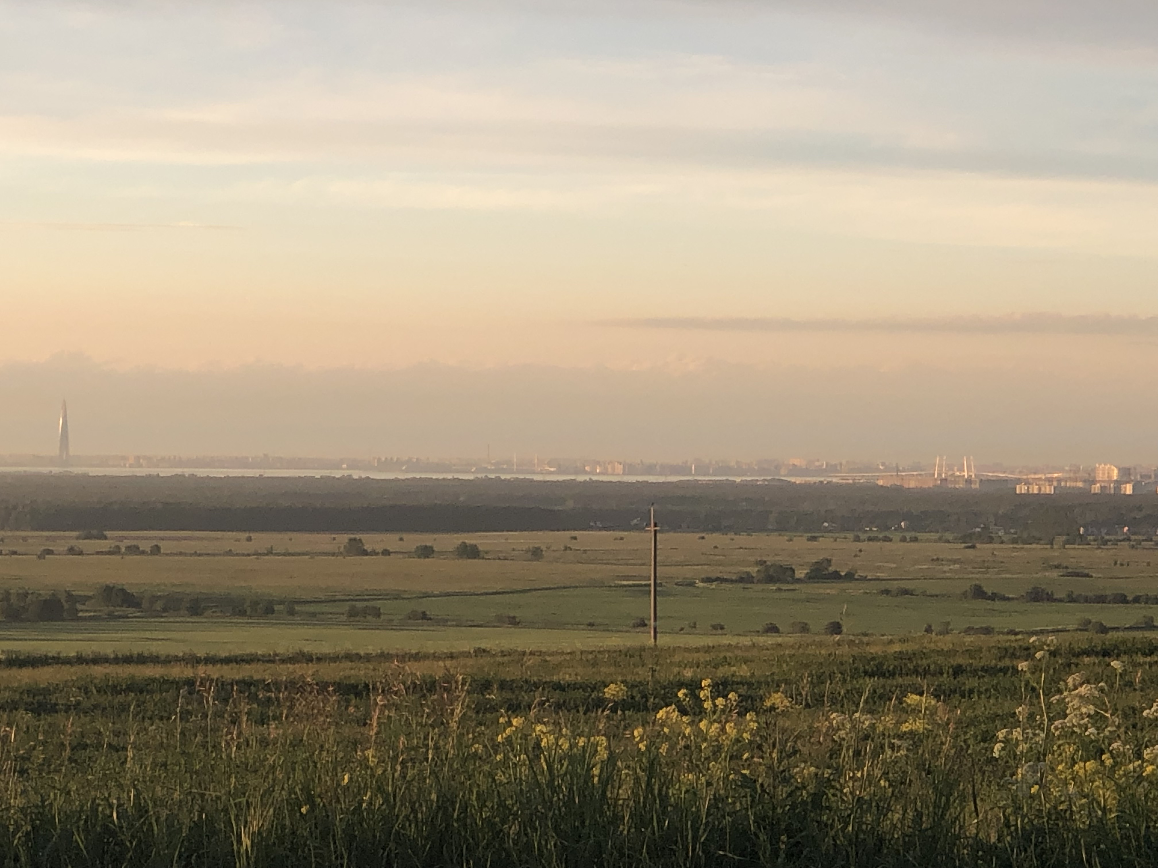 Вид из поселка Капорское